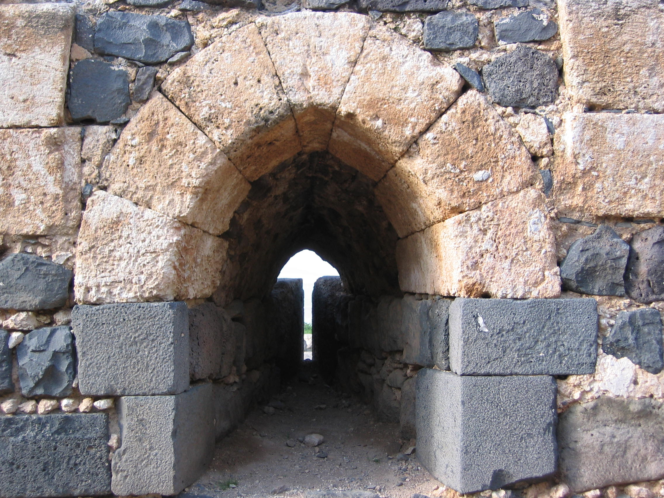 חרך ירי, כוכב הירדן.